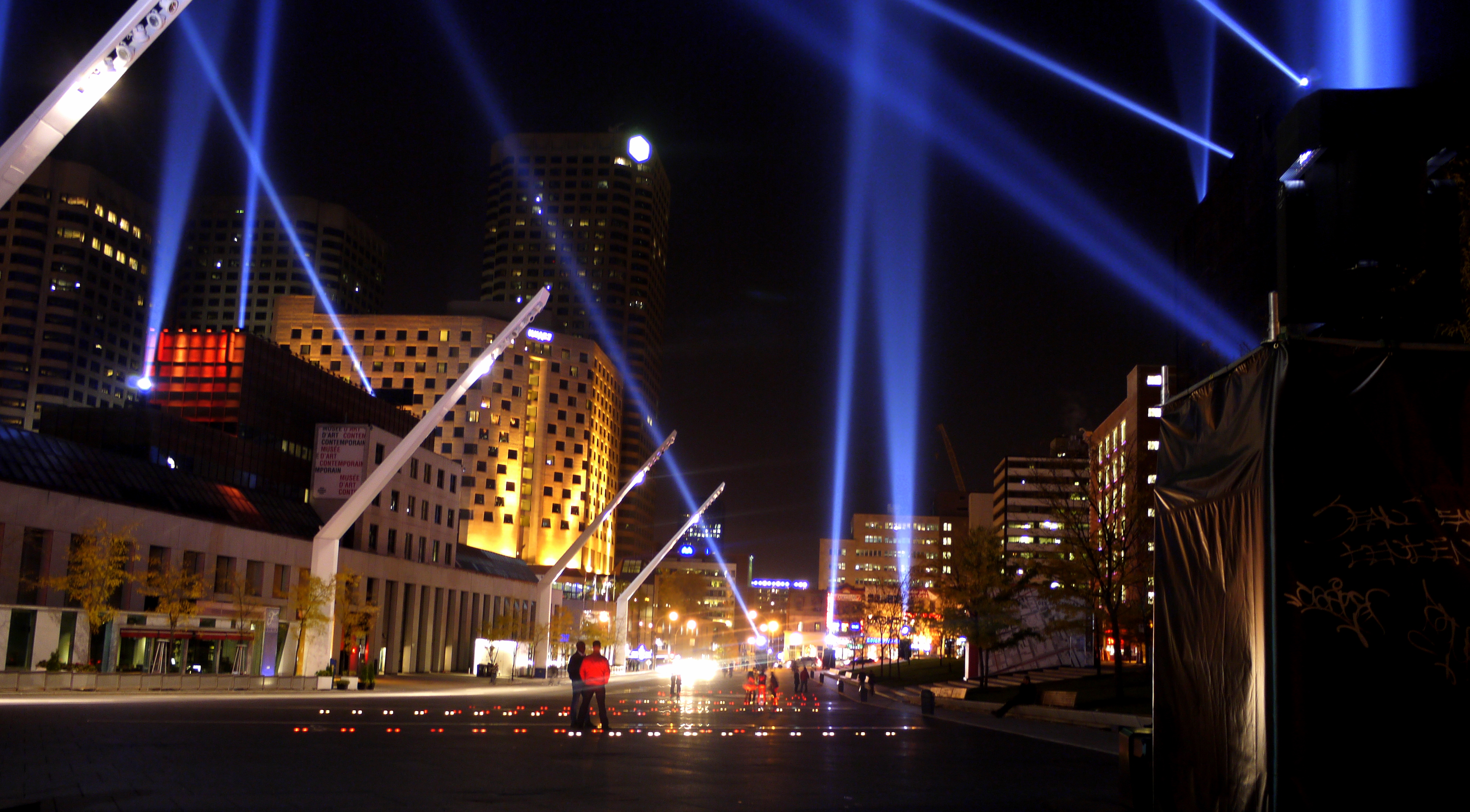 Place des festivals, Montréal Dans le cadre de la Triennale, le Musée d'art contemporain présente, en collaboration avec le Partenariat du Quartier des spectacles, Intersection articulée. Architecture relationnelle 18, une œuvre magistrale de Rafael Lozano-Hemmer spécialement conçue pour la place des Festivals.